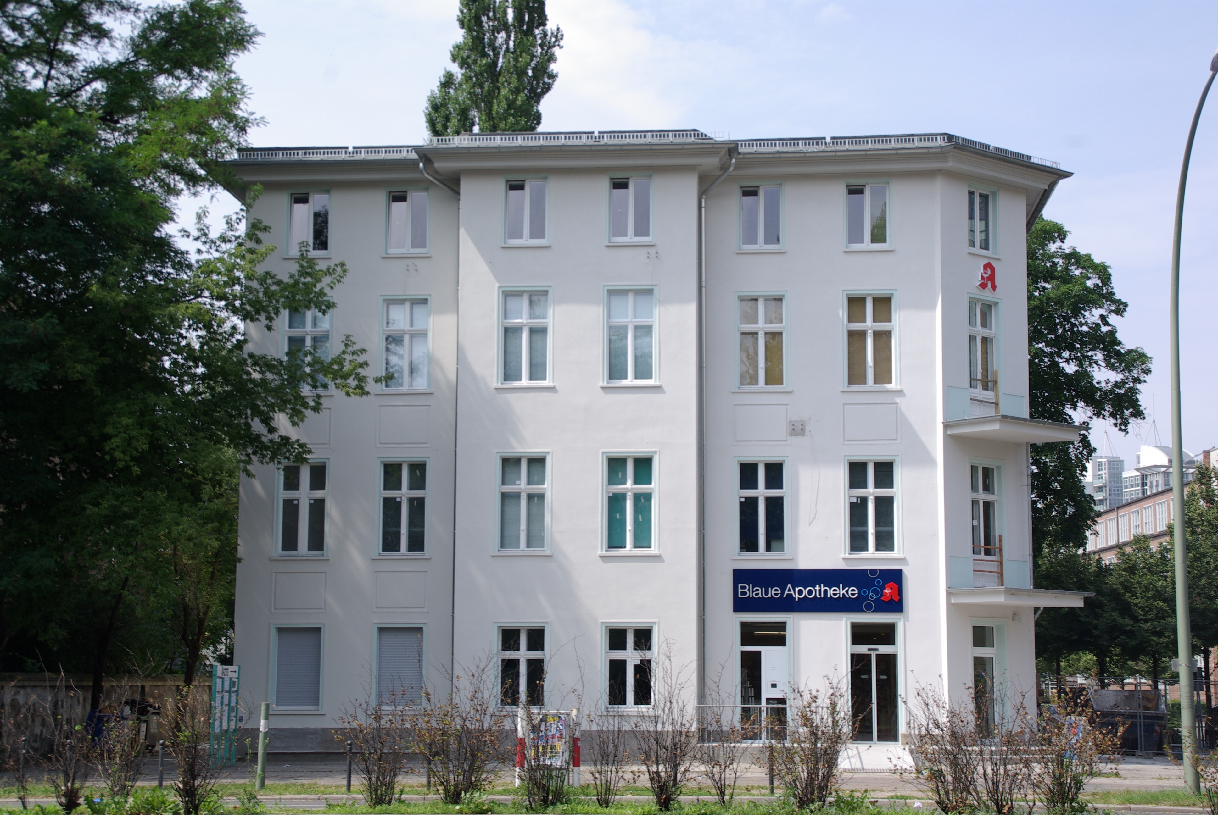 Berlin, Alt Treptow. Das Haus Elsenstraße 1 steht unter Denkmalschutz. .